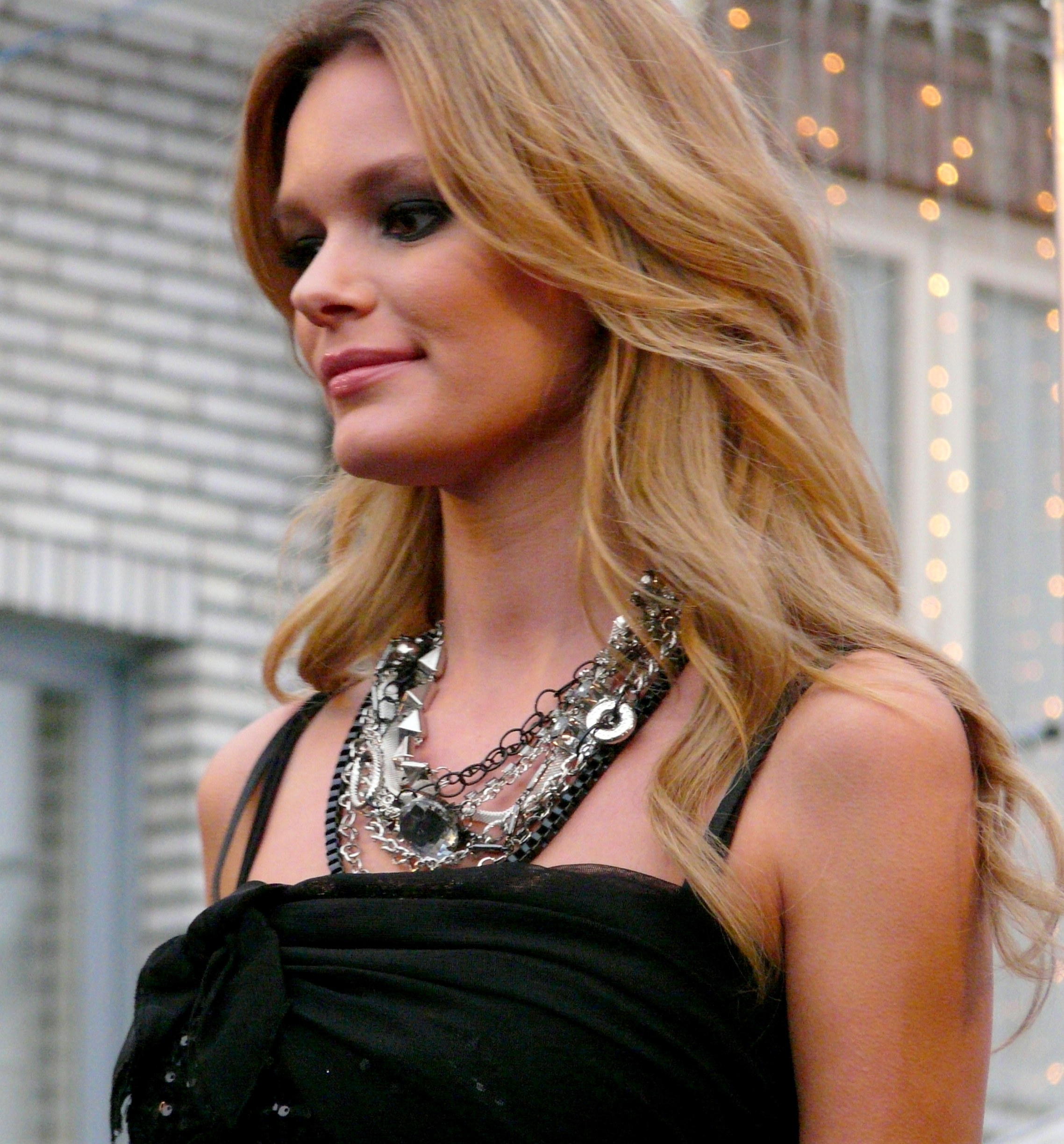 Claudia Scheelen